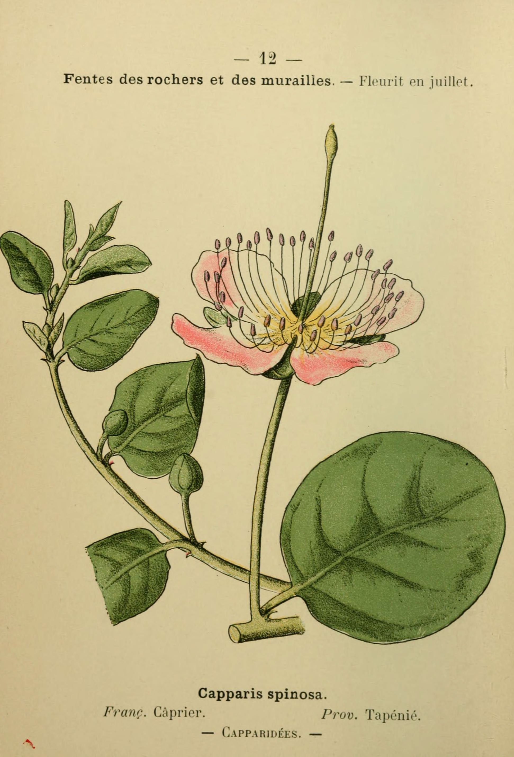 12 — Fentes des rochers et des murailles. — Fleurit en juillet. Capparis spinosa. Franc. Câprier. Prov. Tapénir — (Iapparujées. —